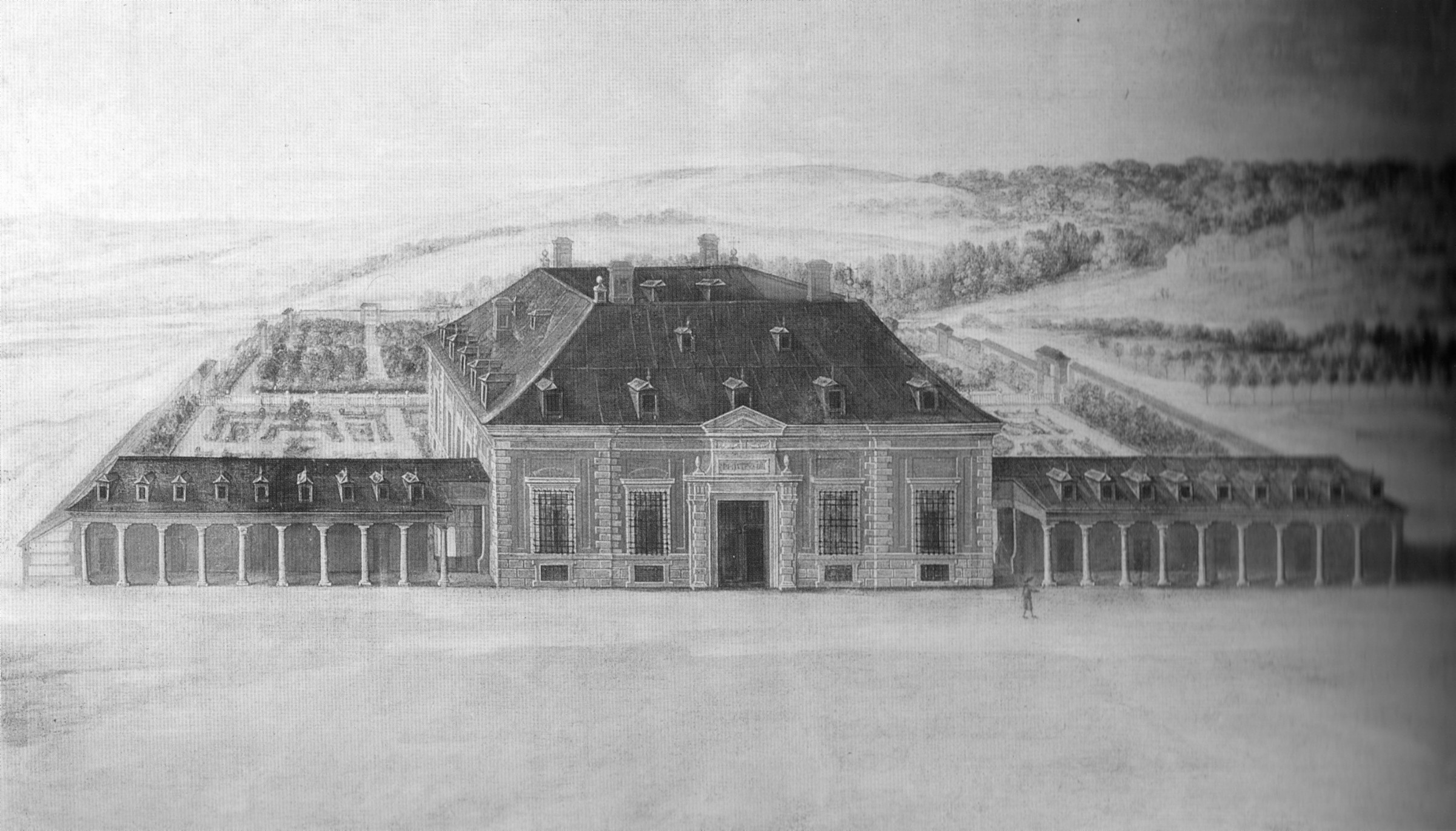 Vista del palacio de la Zarzuela